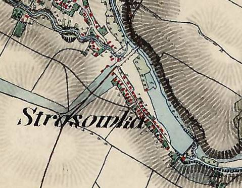 XIX ст.